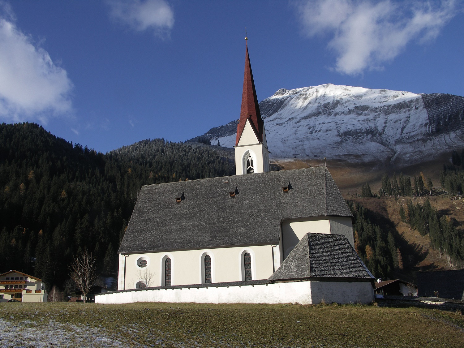 Kath. Pfarrkirche hl. Nikolaus und Friedhof mit Friedhofskapelle und Kriegergedächtniskapelle